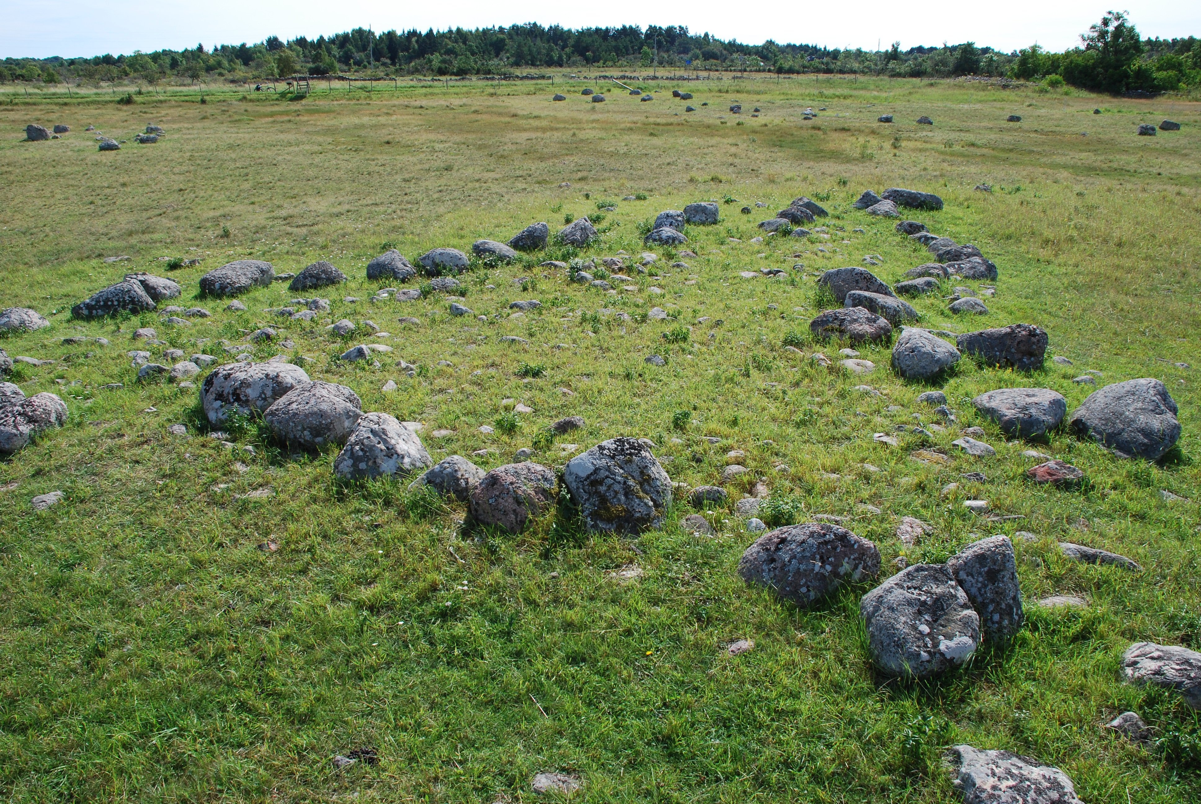 Treudd på Vi alvar, Källa socken, Borgholms kommun, Öland, Sverige.